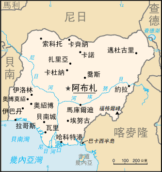 奈及利亞地圖。